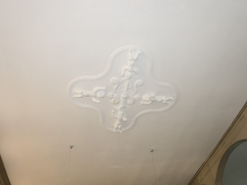 Deckenwappen derer von Bredow um geben von Engeln in der Dorfkirche Pessin